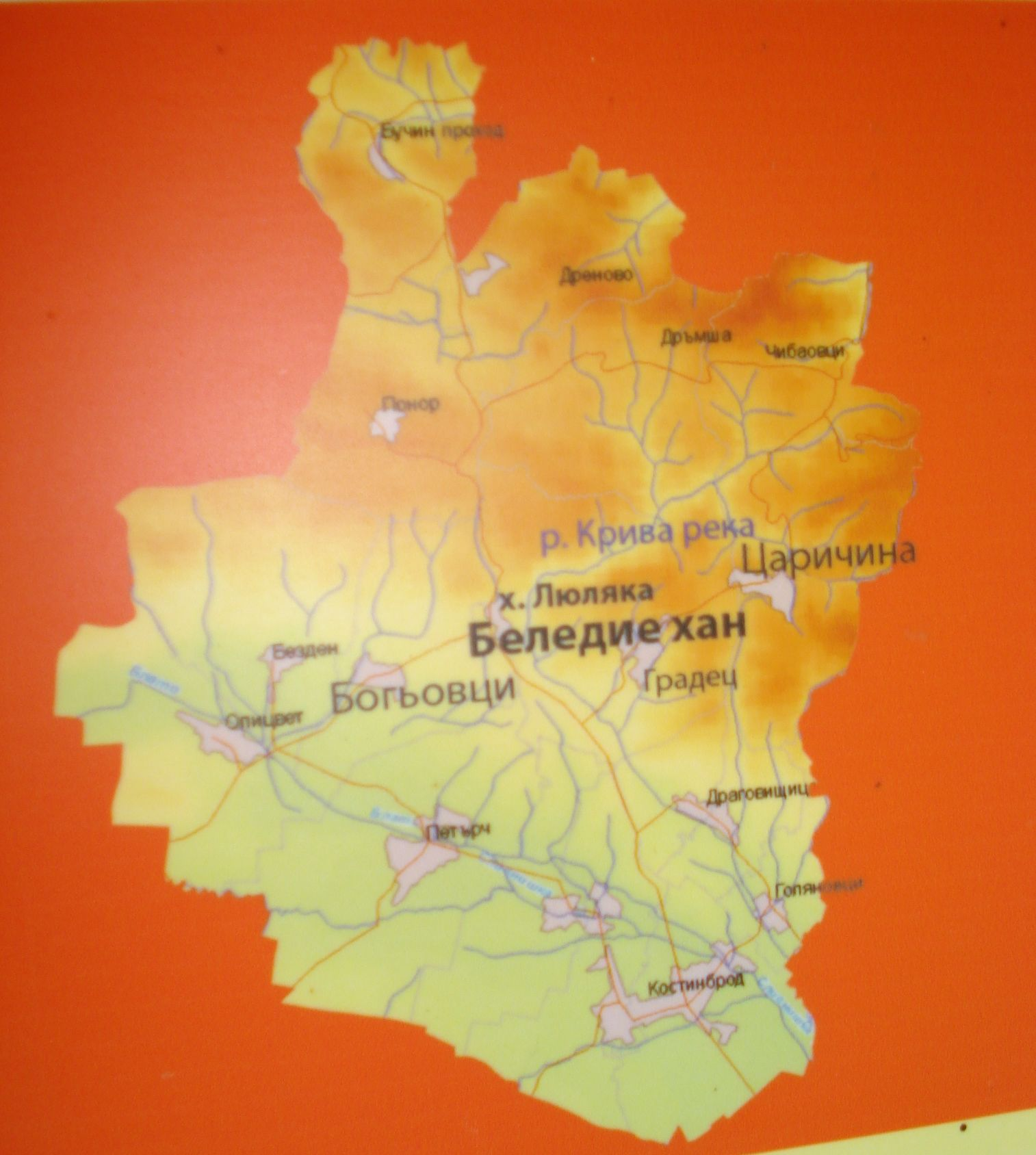 Карта на Беледие хан